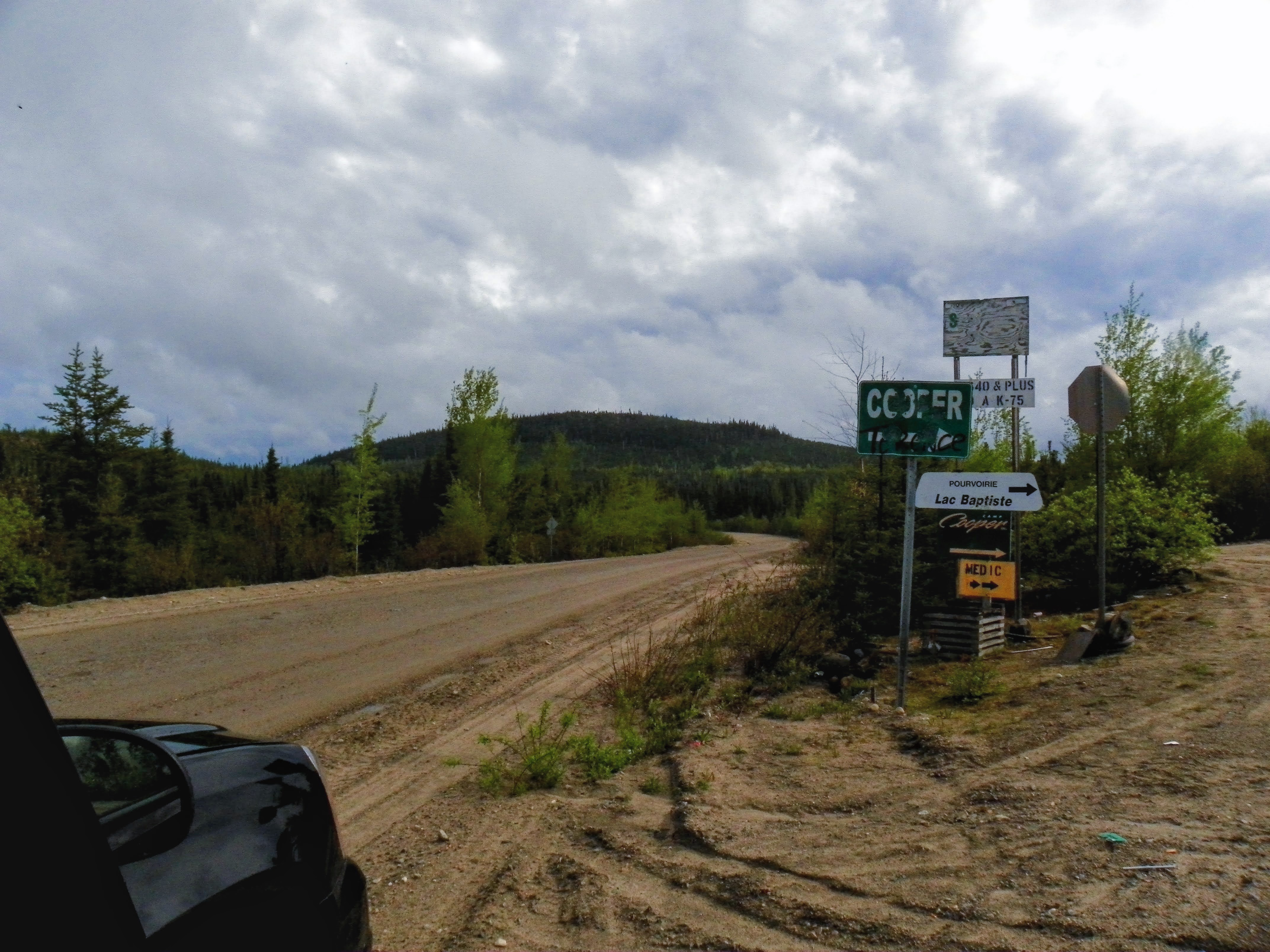 À la jonction des routes forestières 0212 et 1046, une annonce des différents services.